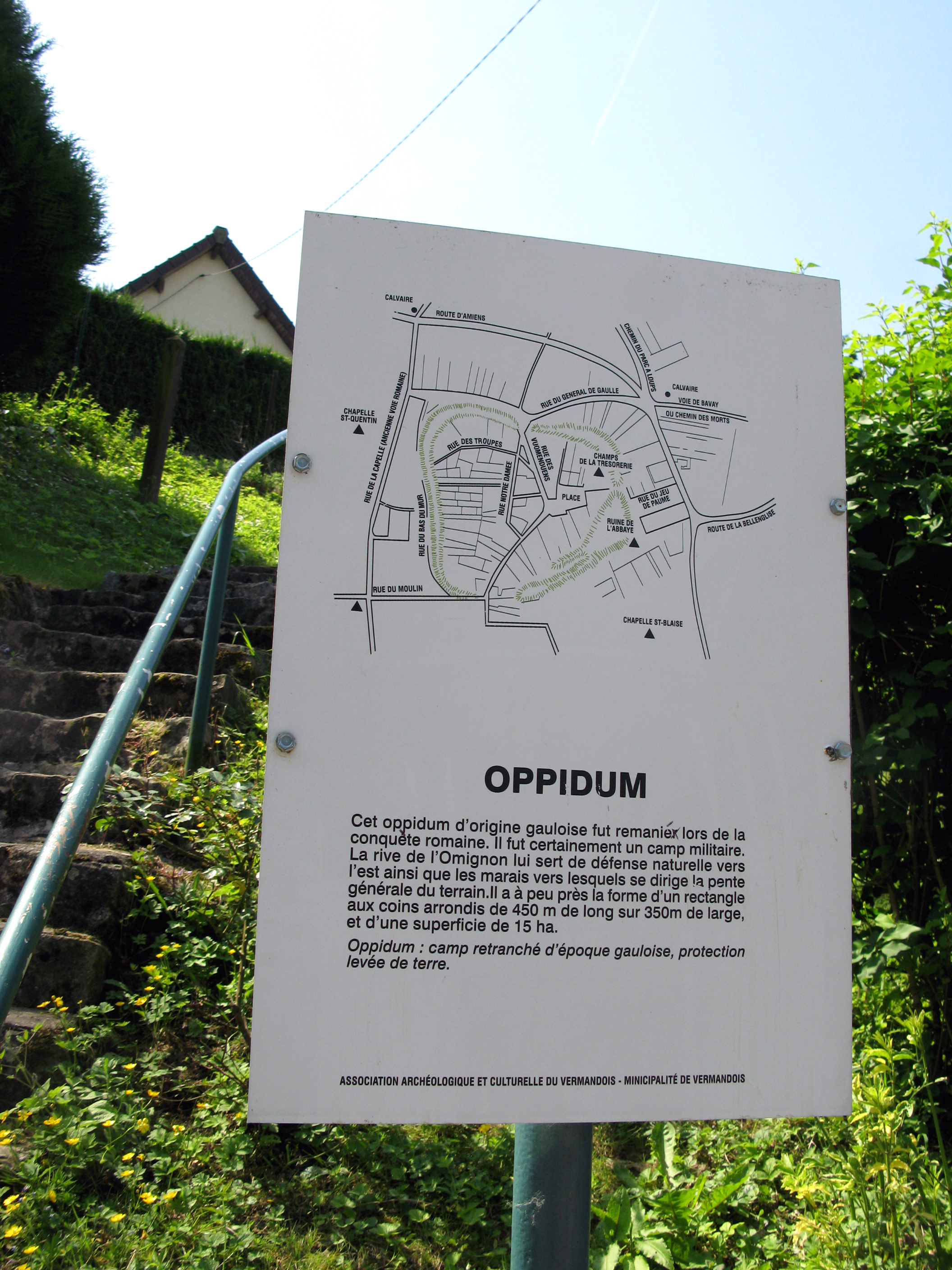 Vermand (Aisne, France) - Panneau informatif installé au début de la levée de terre de l'oppidum. Présentation rapide "in situ" de l'oppidum. Sur cette vue, les quelques marches visibles en arrière-plan et le pignon de la maison derrière le talus permettent une estimation de sa hauteur.